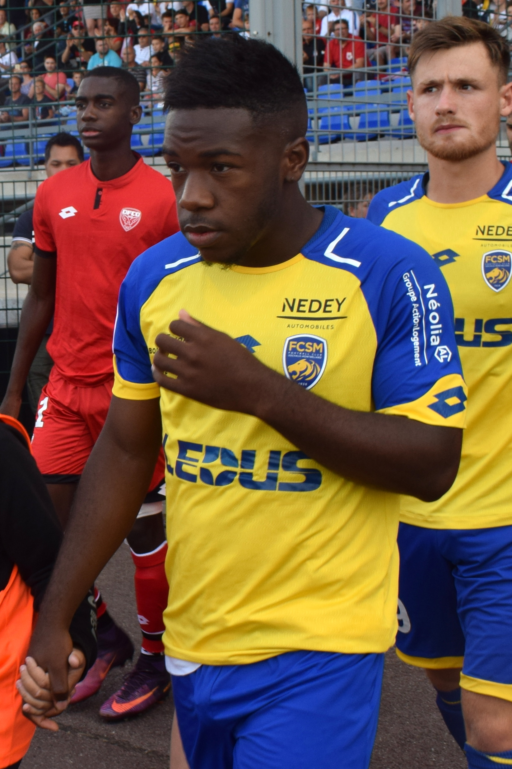 FCSM*DFCO